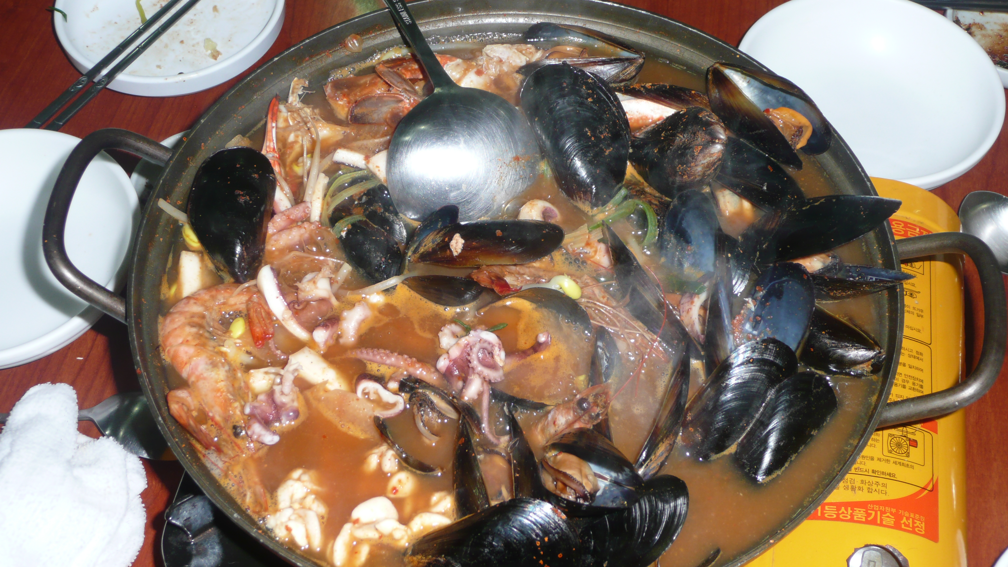 Haemultang - Meeresfrüchte und Gemüse in einem Topf gekocht